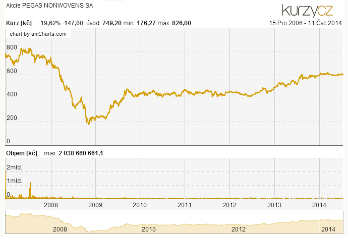 Akcie PEGAS NONWOVENS - Graf vývoje kurzu na Burze Praha.